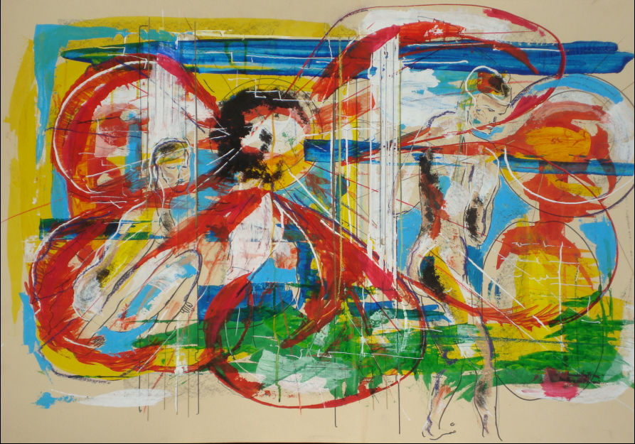 2006, 120/90 cm, Acrylique